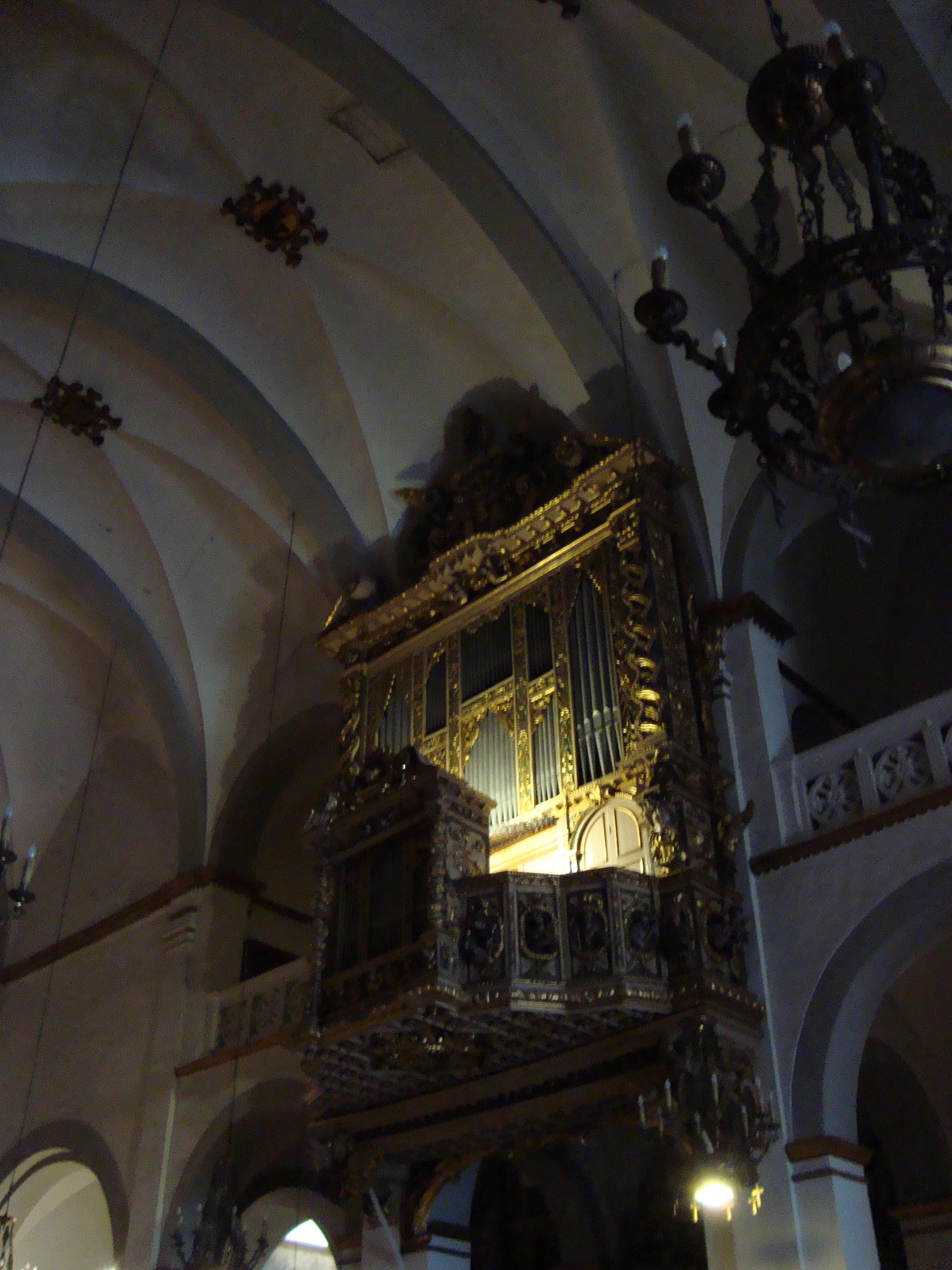 Orgue de l'església parroquial de Sant Bartomeu i Santa Tecla de Sitges Organ in the parish church of Sant Bartomeu i Santa Tecla of Sitges